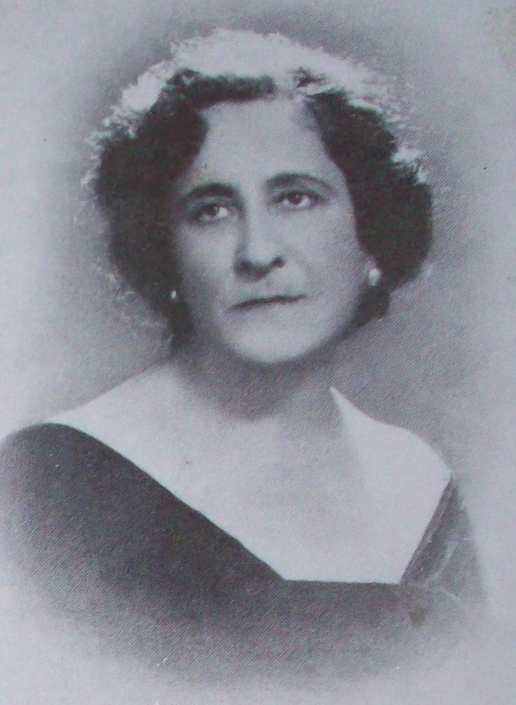 Giulia Recli